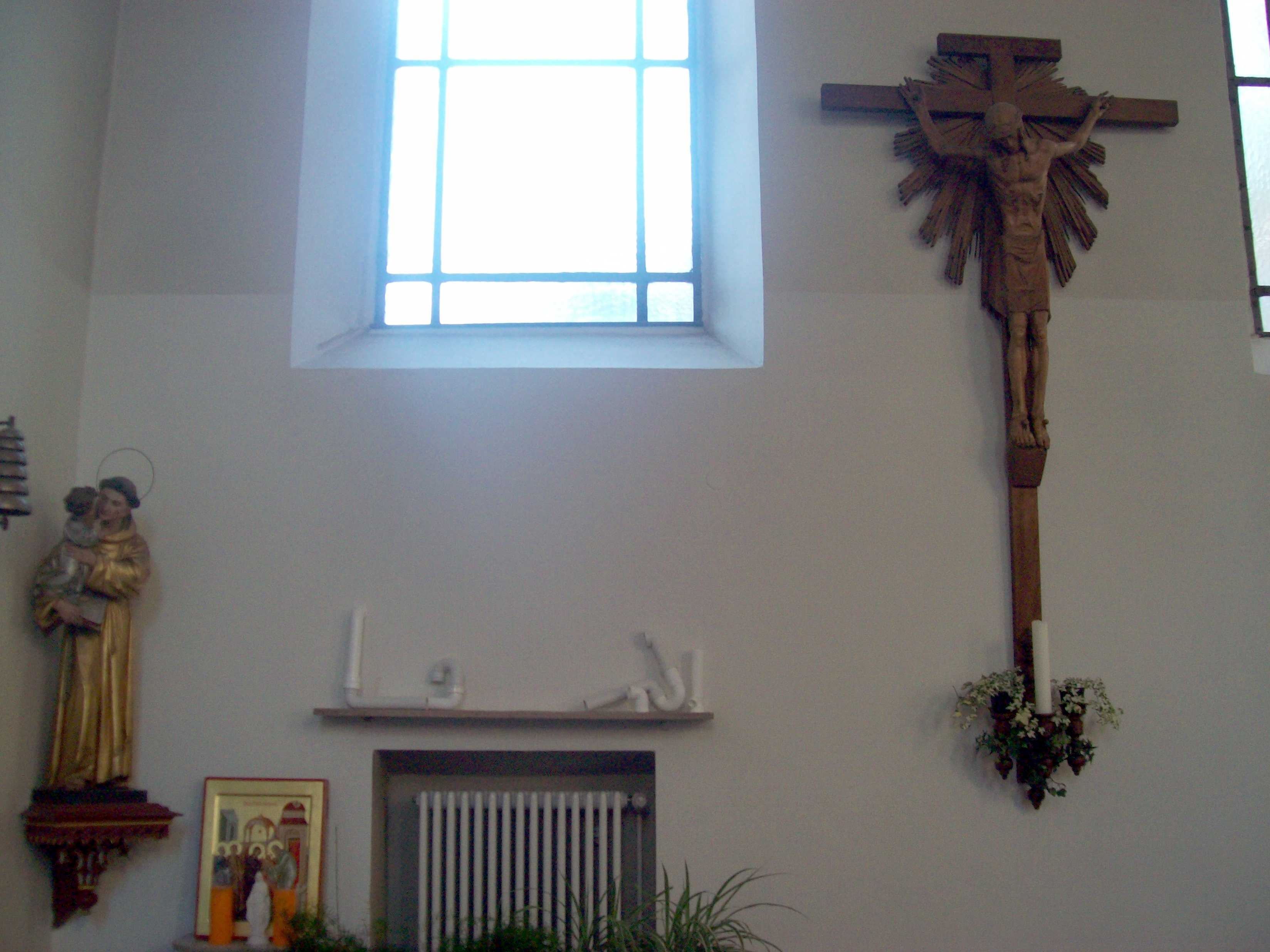 Spitalkirche St. Katharina am ehemaligen Städt. Krankenhaus Nordwand